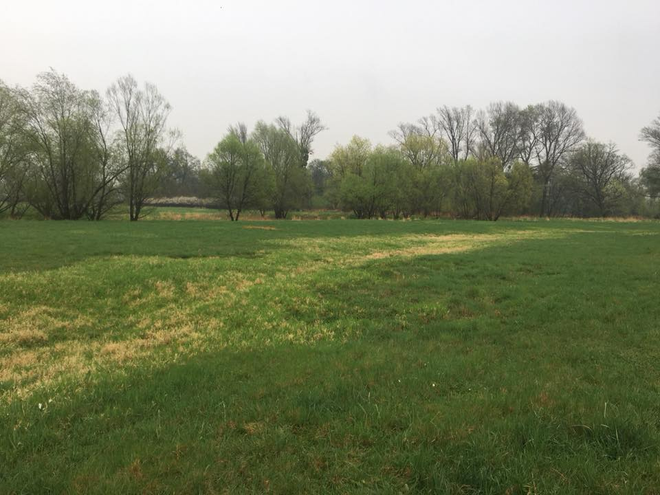 Wyraźne zagłębienia terenu na równinie zalewowej doliny Bystrzycy. Widoczna wyraźna różnica pomiędzy powierzchnią równiny, a zagłębieniem paleomeandra.